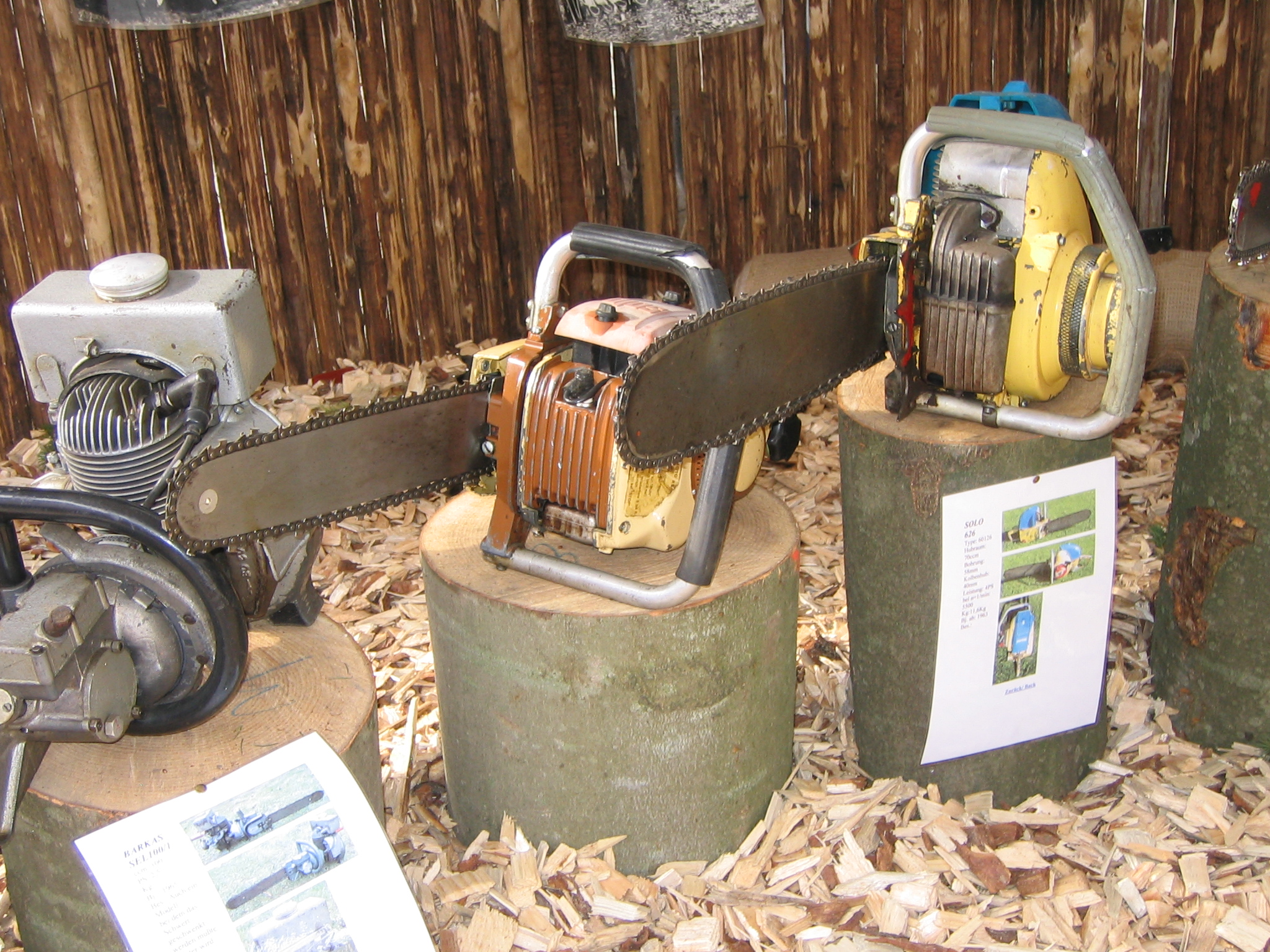 Kettensägen des deutschen Herstellers Solo auf dem Festival Staufen Stages am Stand der Klaus Bärmann GmbH